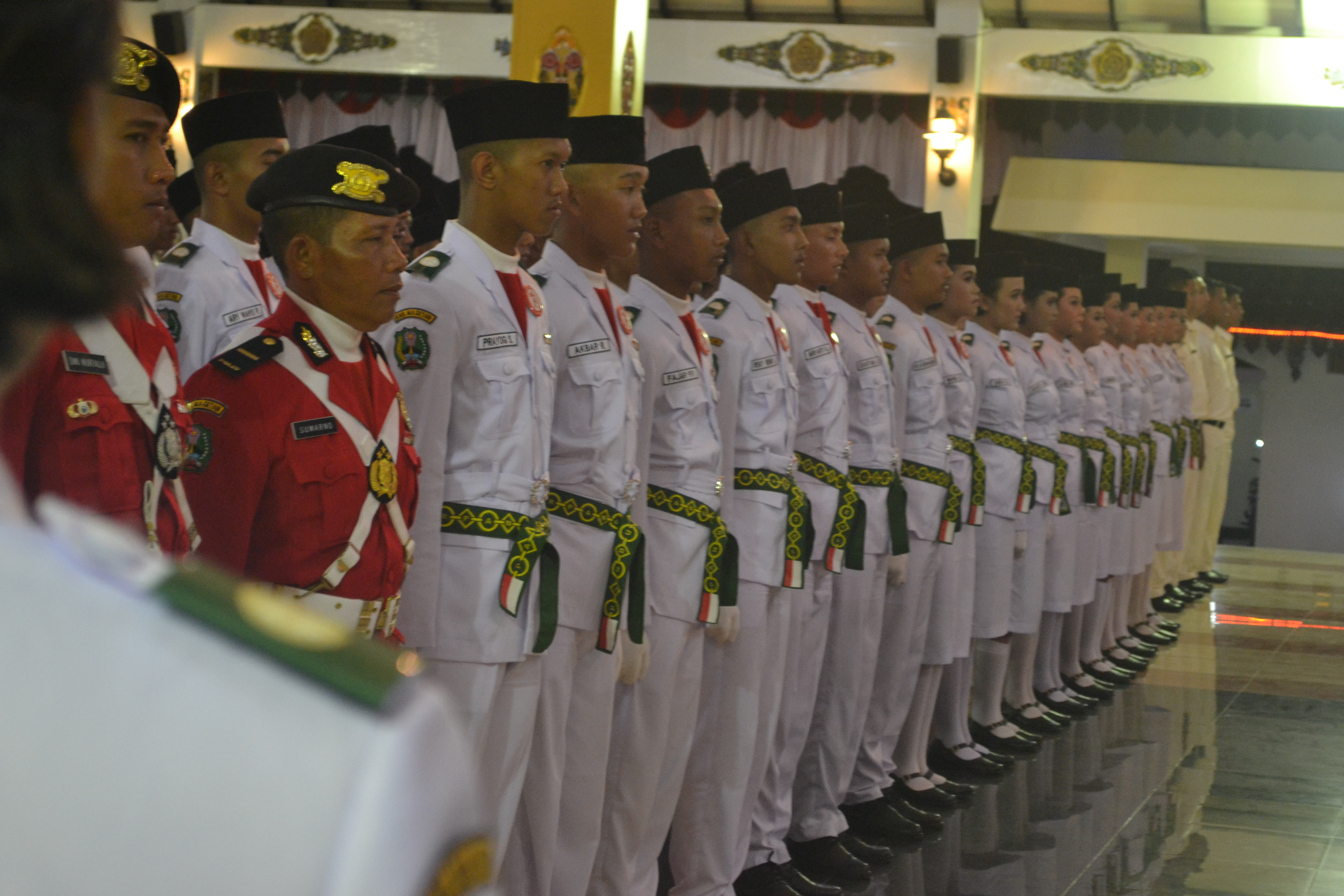 Pengukuhan Paskibraka